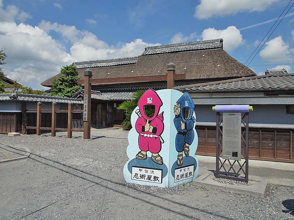 Koga-ryu Ninjya house , 甲賀流 忍術屋敷